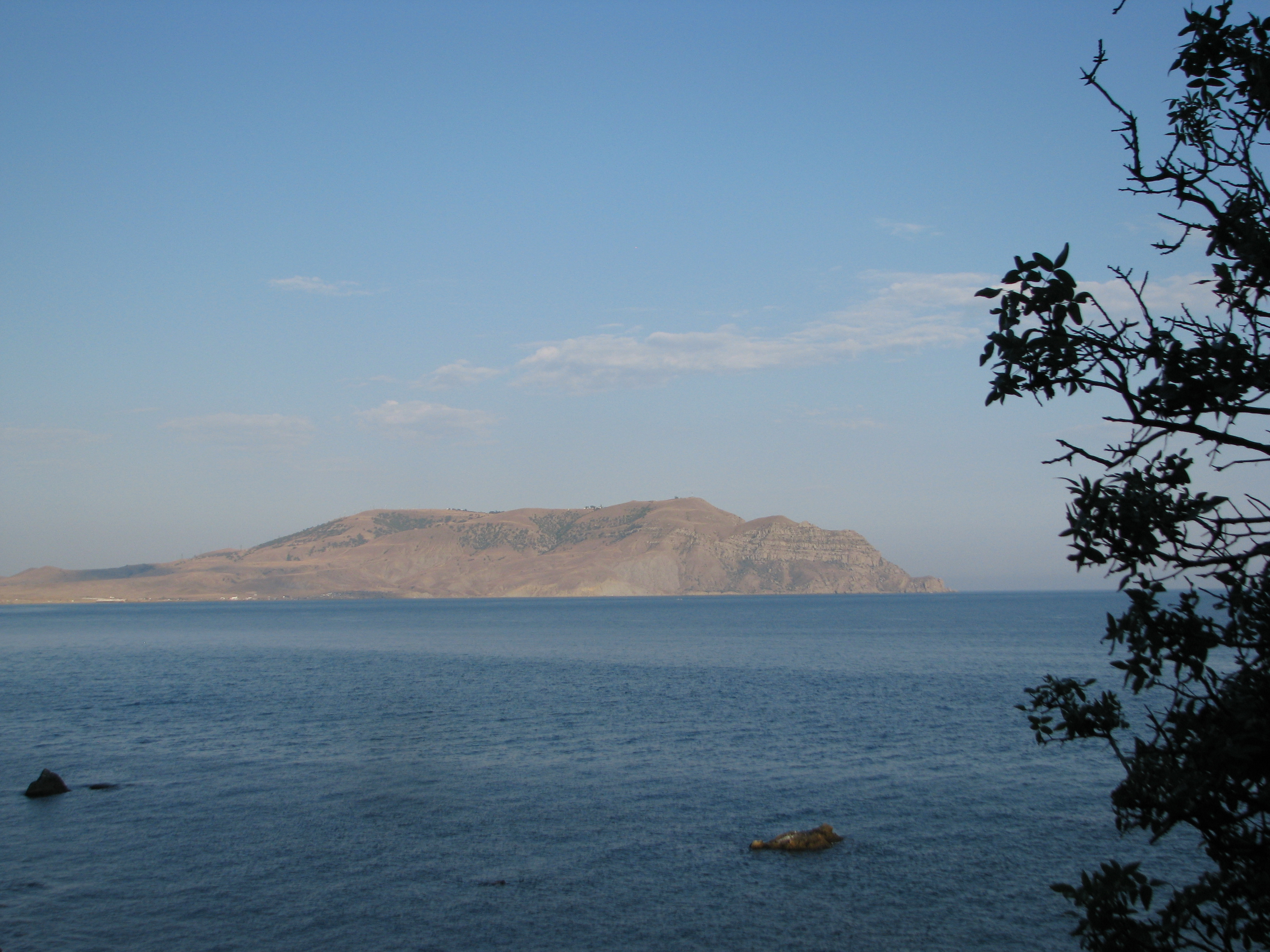 Меганом с мыса Алчак, Крым